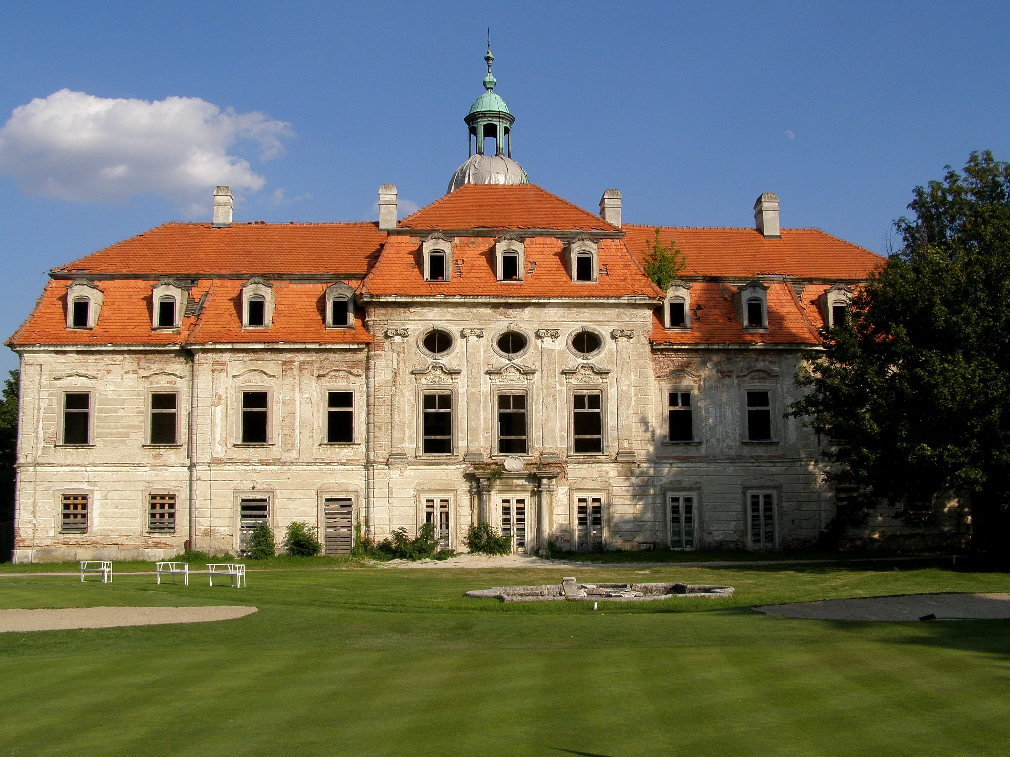 Severozápadné priečelie kaštieľa v Bernolákove je obrátené do niekdajšieho zámockého parku